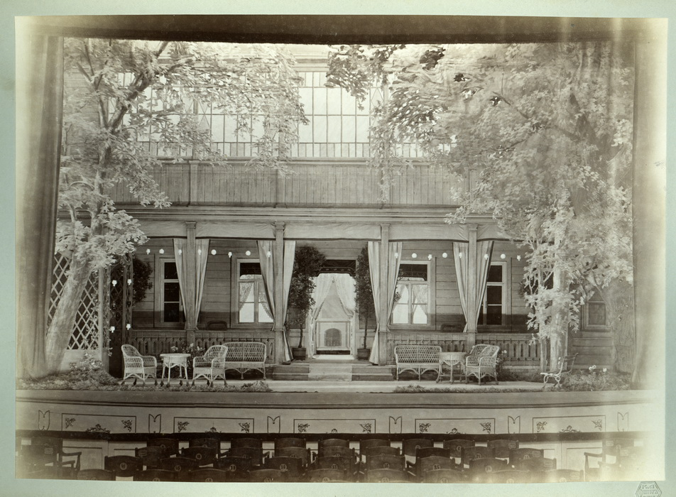 Малый театр, "Без вины виноватые"; А. Н.Островский; режиссёр А. П. Ленский; фотограф Леонидов